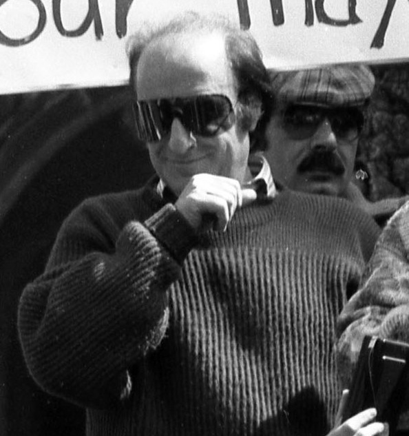 Giorgio Bracardi alla manifestazione Anti fast food Piazza di Spagna 1986